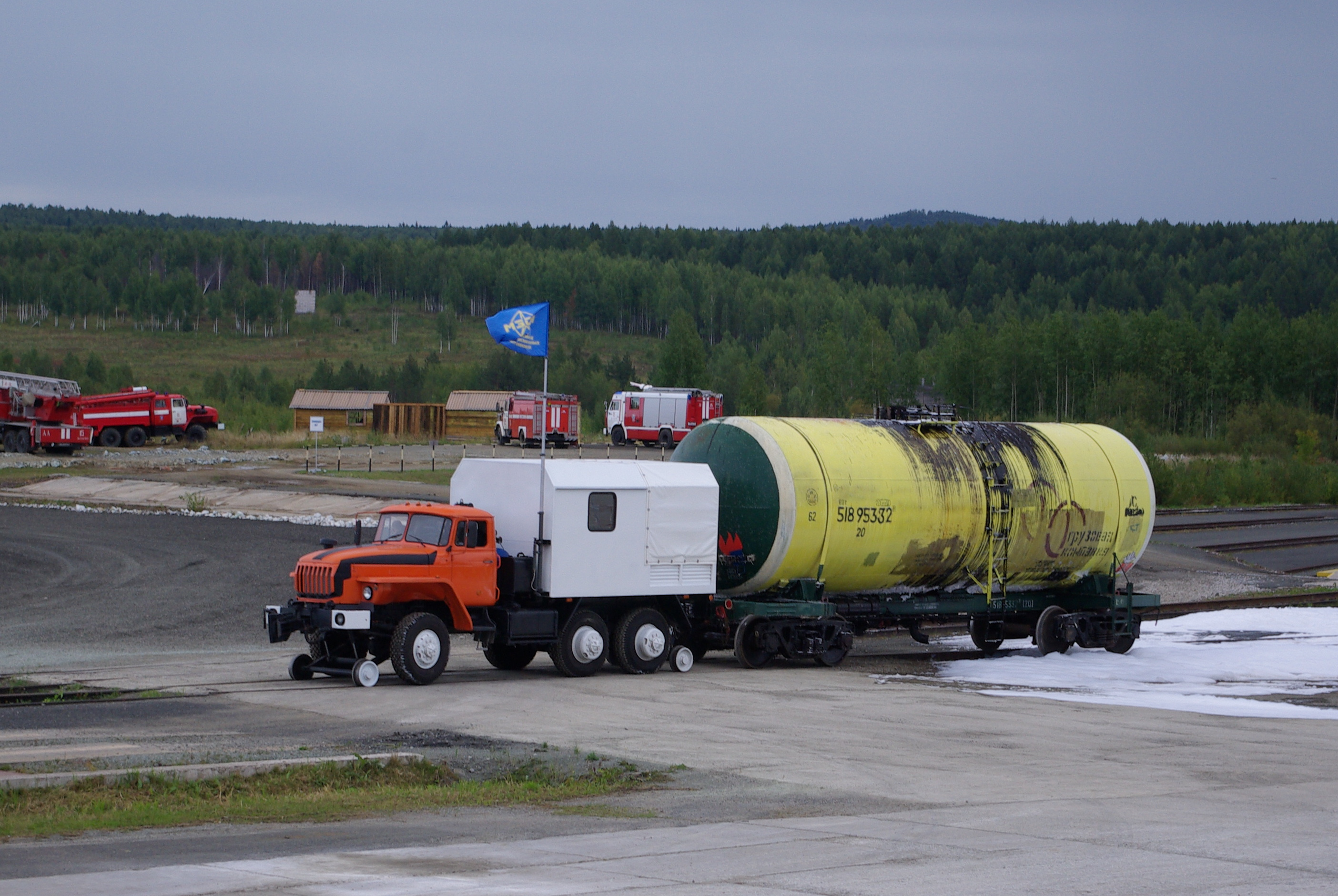 Демонстрация локомобиля МАРТ-3 на выставке «Оборона и защита-2012» в Нижнем Тагиле